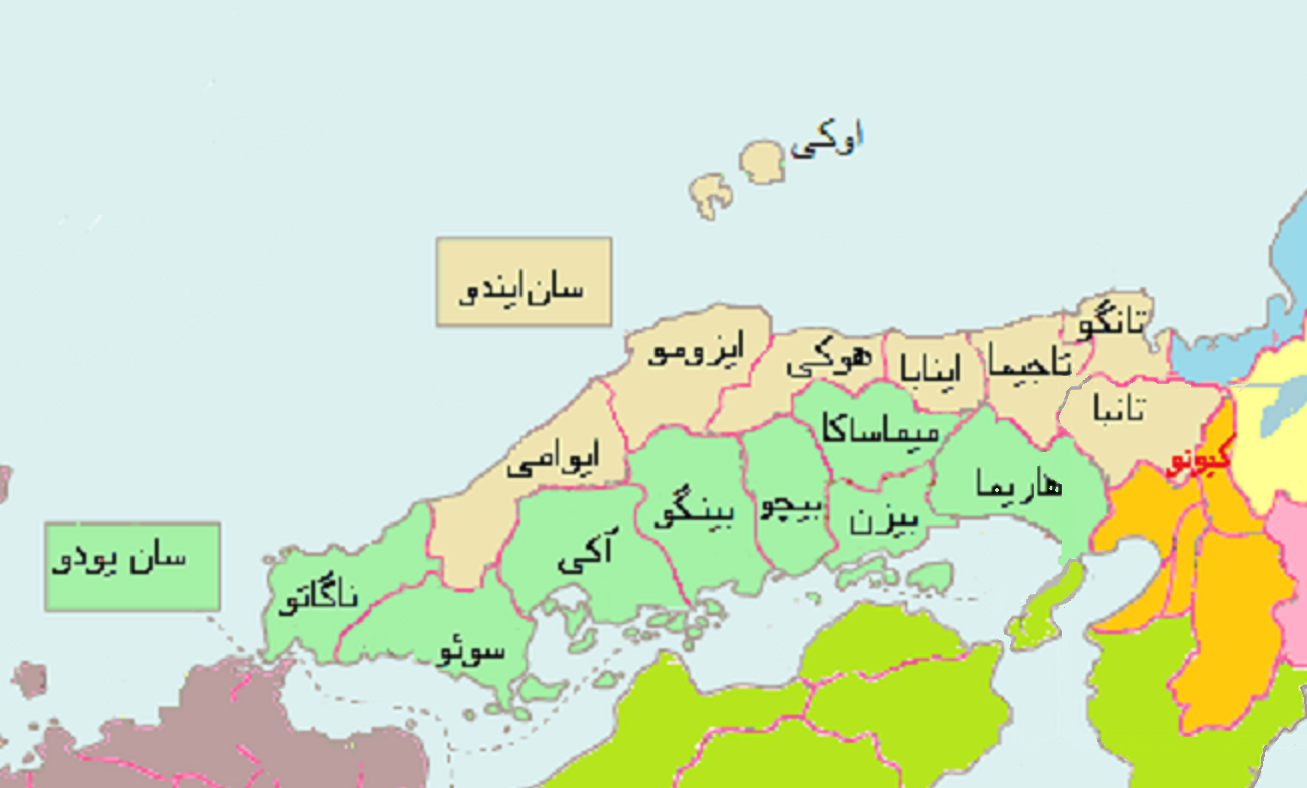 منطقه چوگوکو در دوره سنگوکو